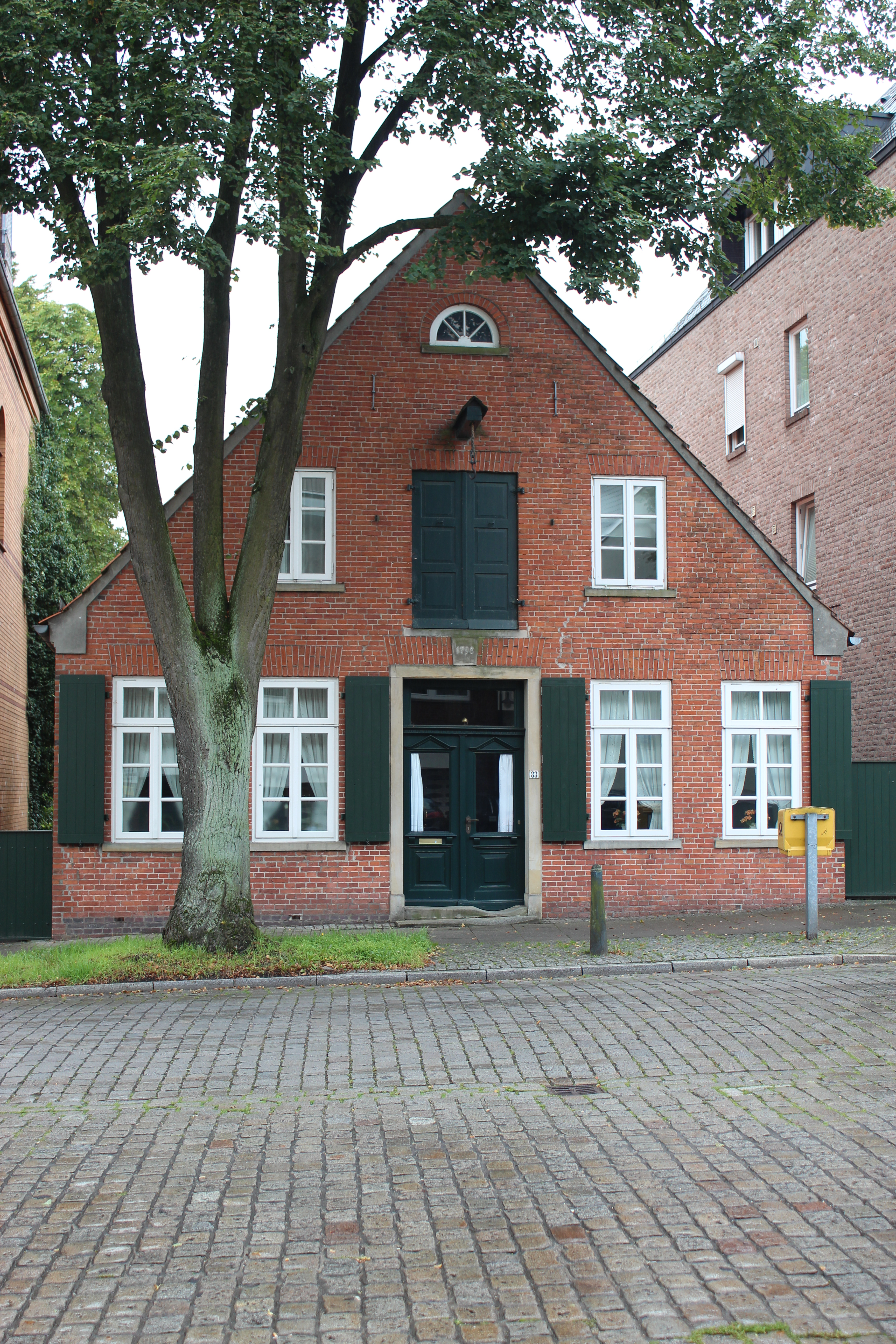 Bäckerei Harbers, Bäckerei Schnatmeyer in Bremen, Weserstraße 83.Das abgebildete Objekt ist ein geschütztes Kulturdenkmal in der Freien Hansestadt Bremen, mit der Nr. 1336 beim Landesamt für Denkmalpflege registriert.